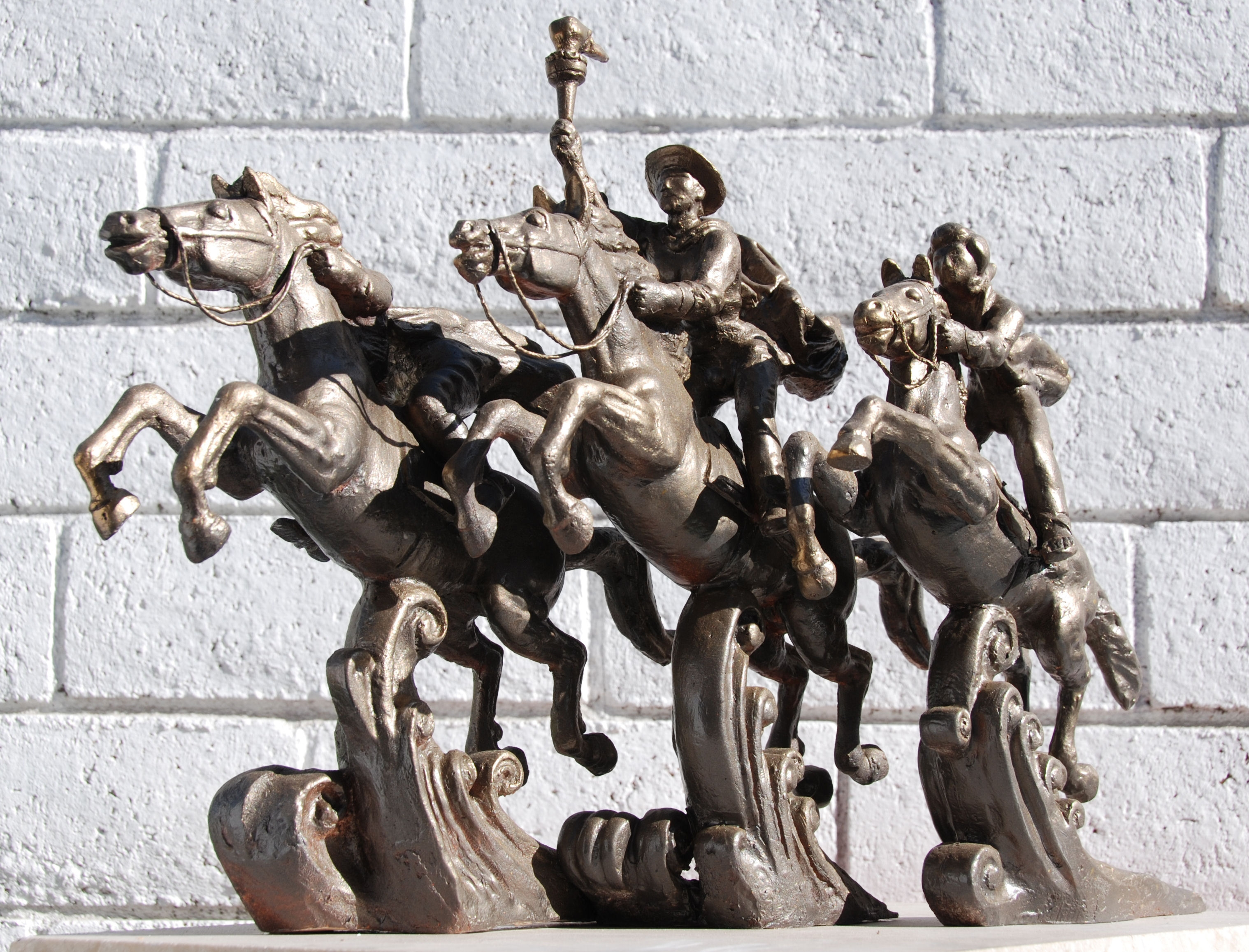 Spartak Babayan: Projekt "Fliegende Reiter", 2009